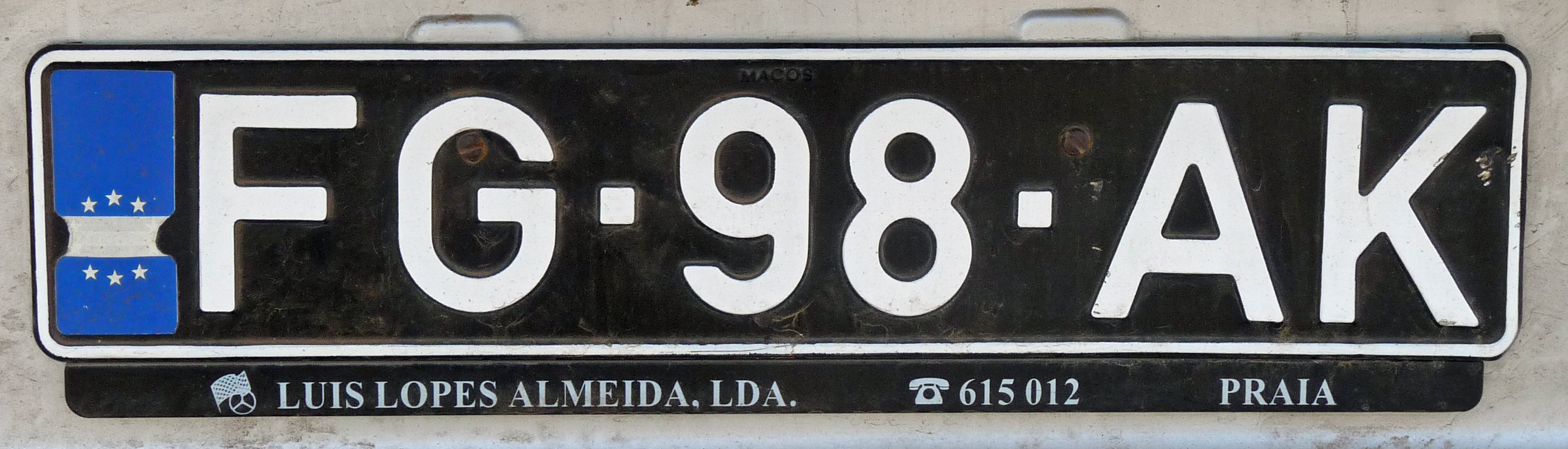 Plaque d'immatriculation de Fogo (Cap-Vert)